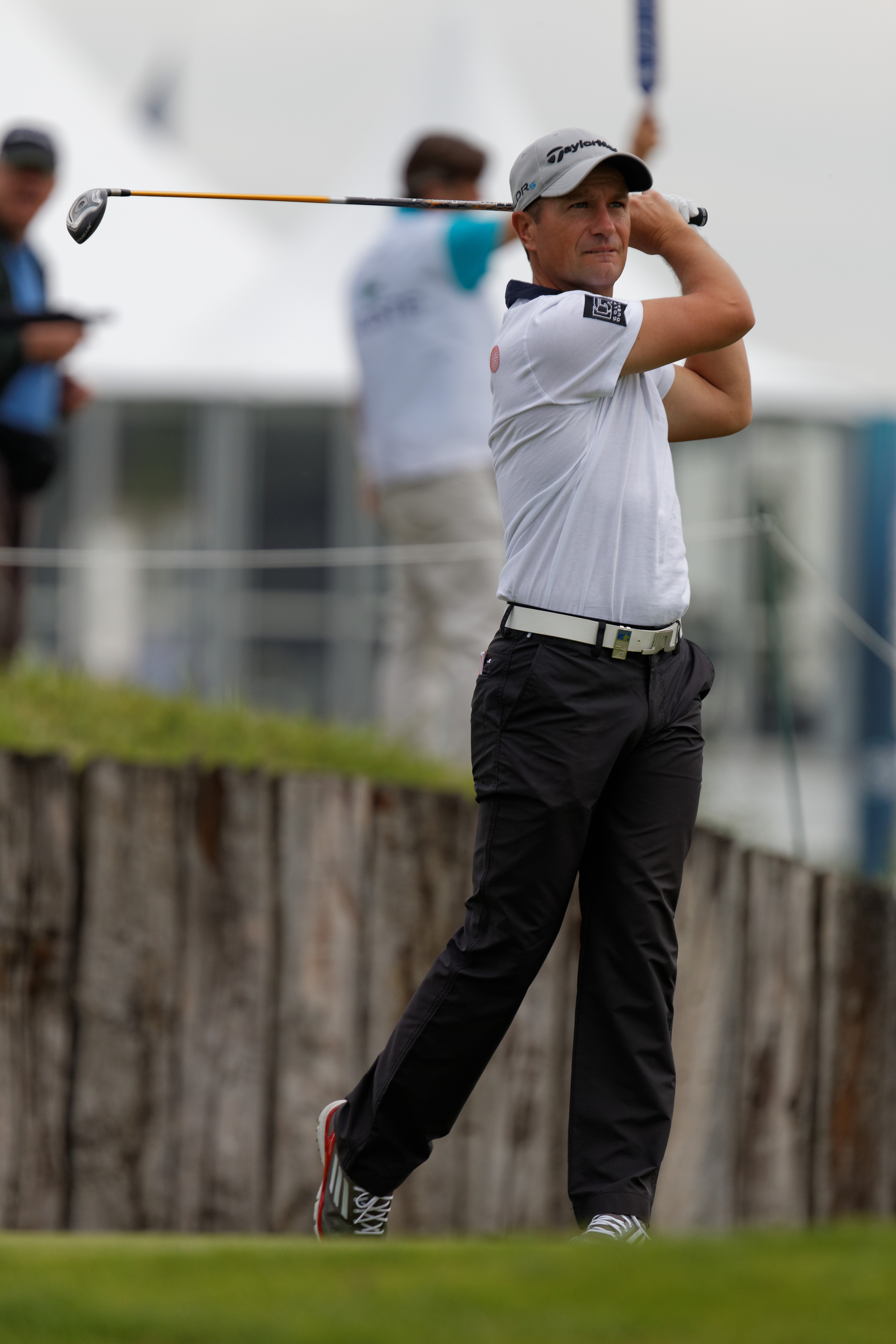 Steve Webster lors du second tour de l'Open de France 2014 - Golf National - Saint-Quentin-en-Yvelines (78) - départ du trou n° 10